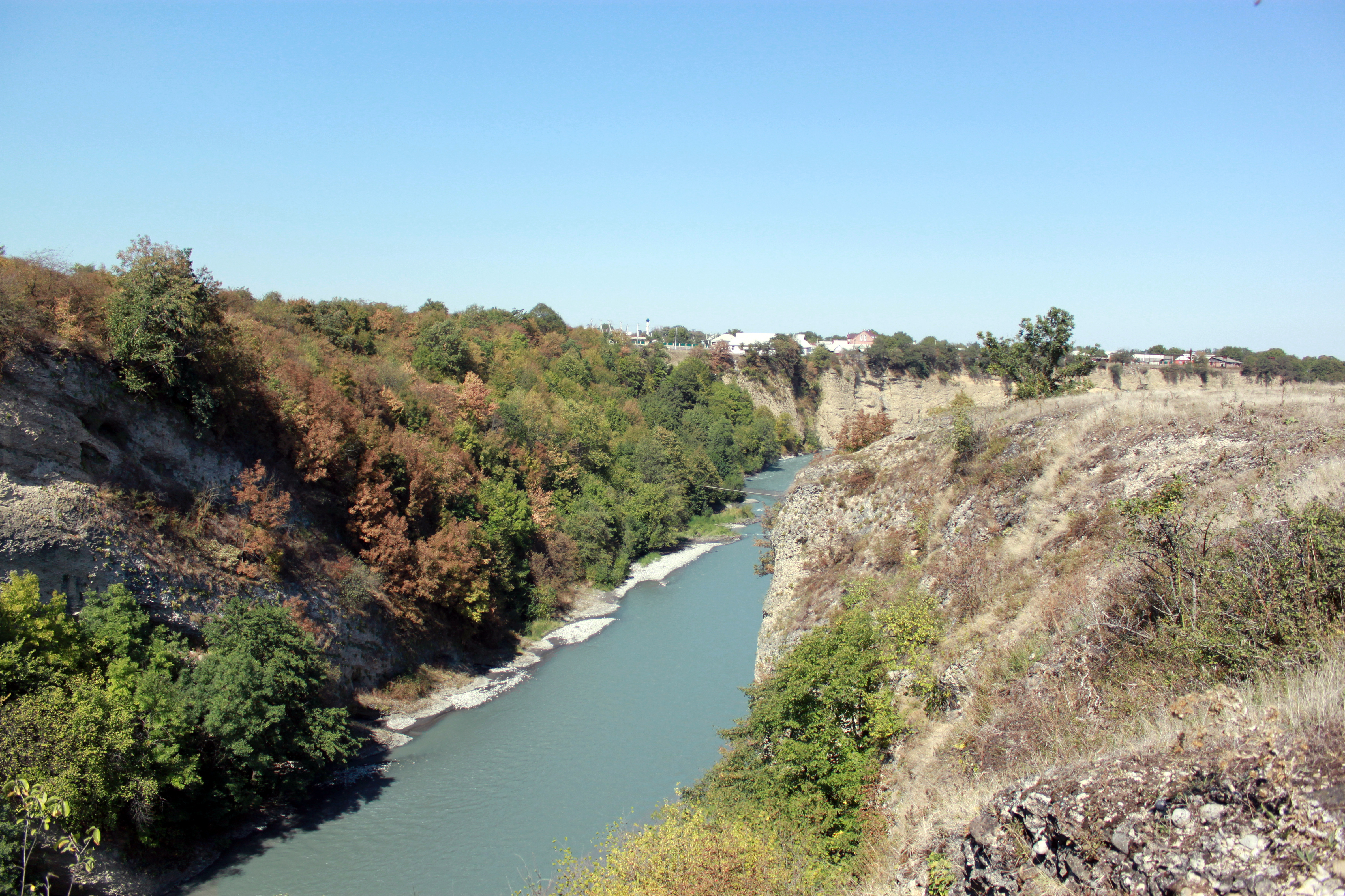 Река Аргун и село Дуба-Юрт